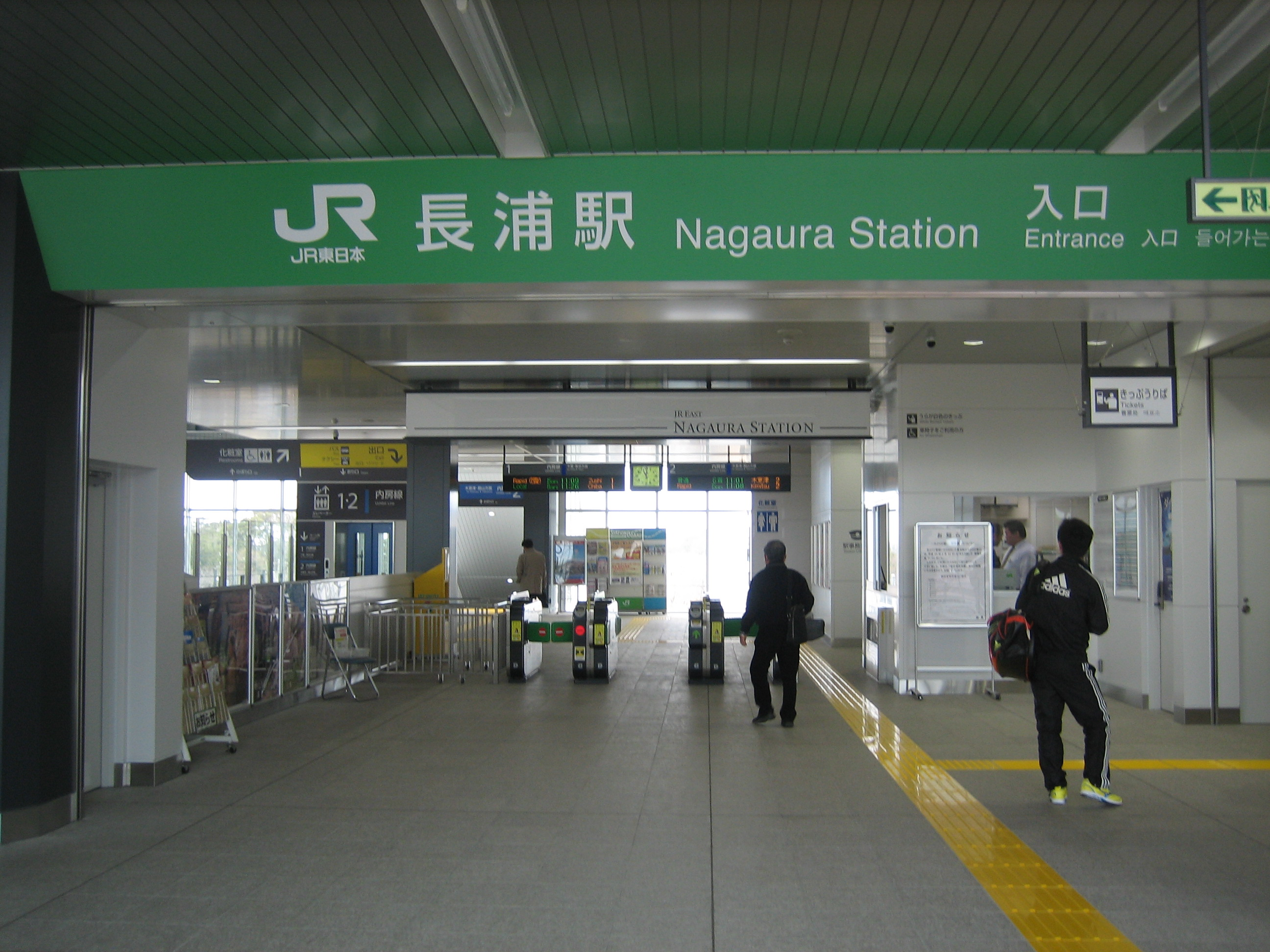 新しく完成した長浦駅の改札口